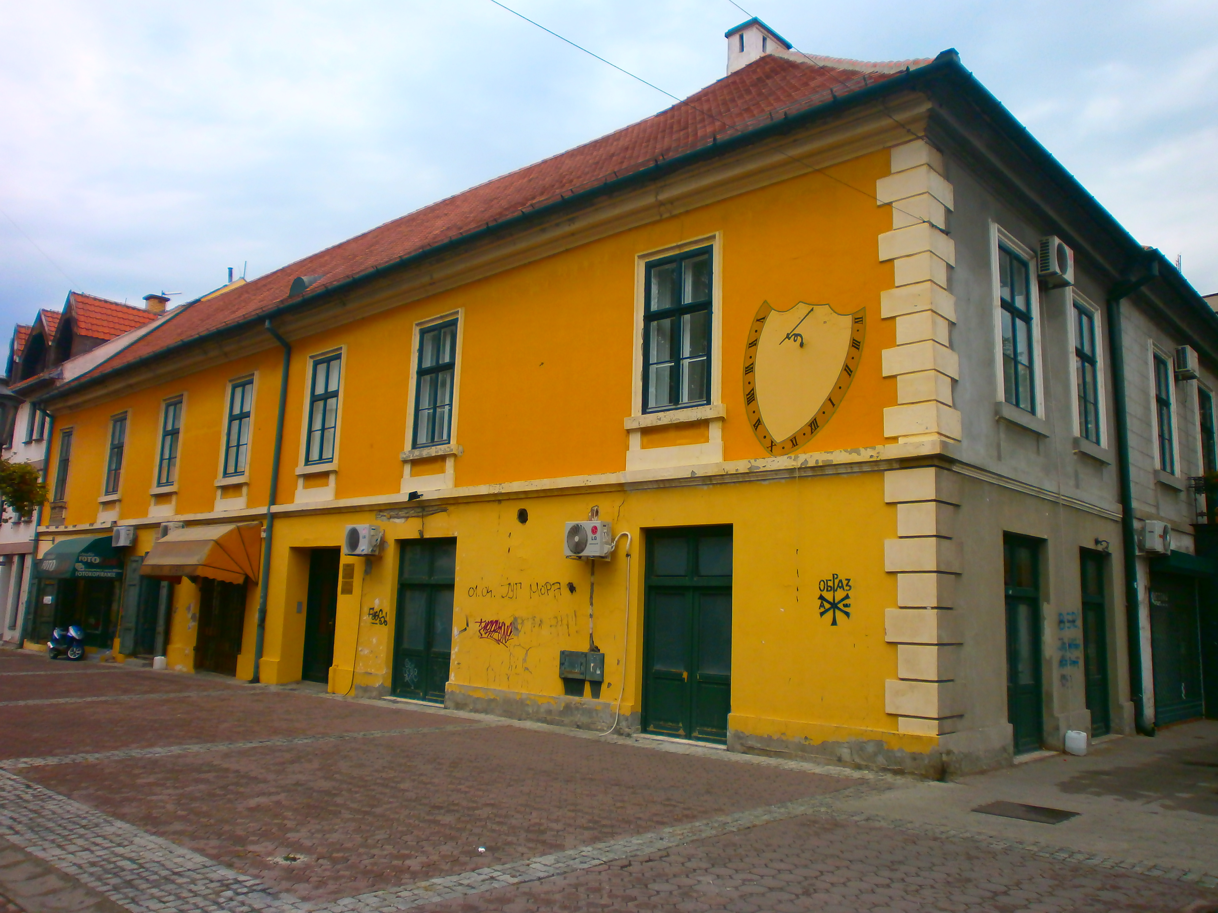 Зграда у Николе Тесле 3 у Панчеву са сунчаним сатом.